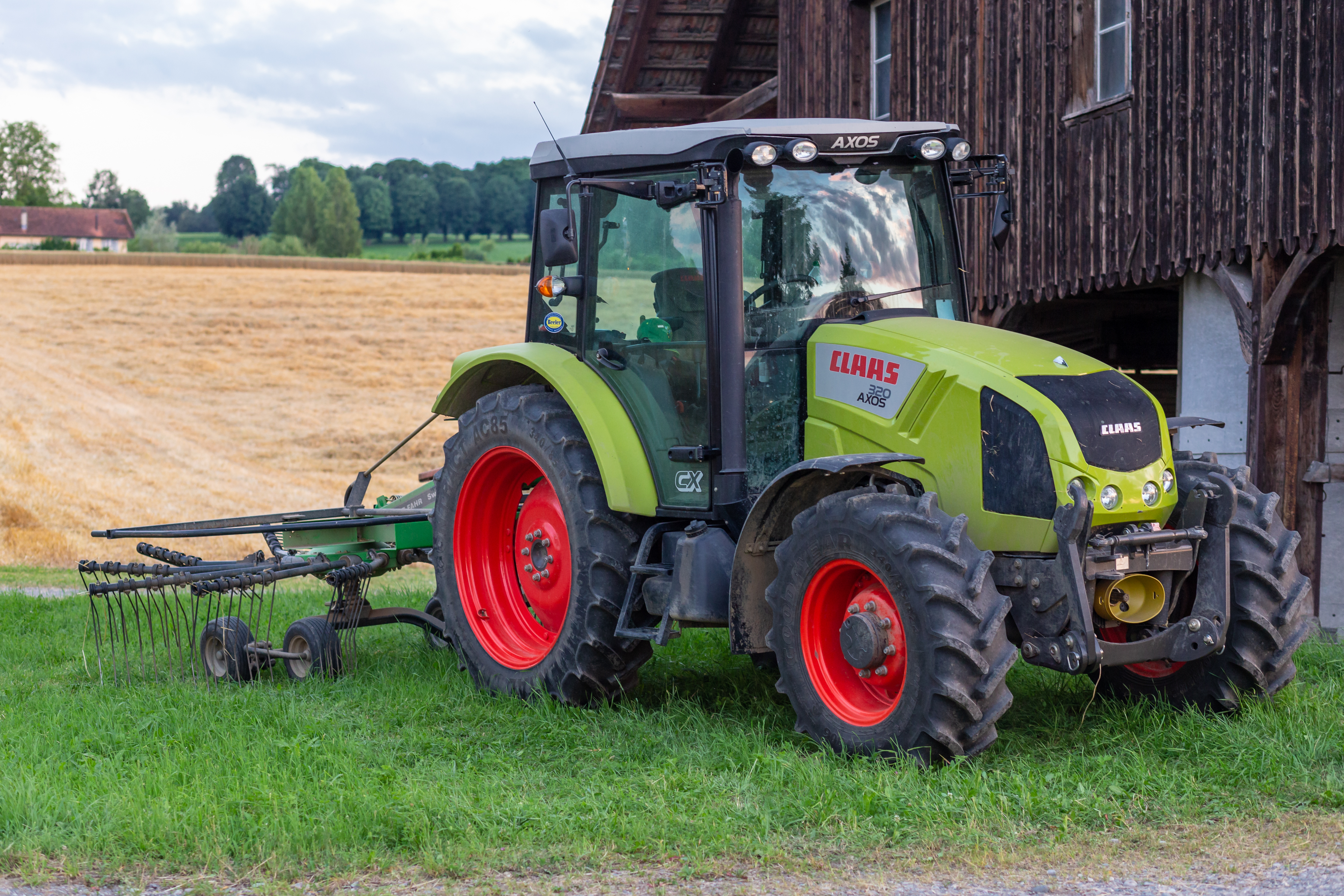 Claas 320 Axos in Kreuzlingen